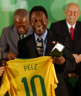 O ex-futebolista brasileiro Pelé.